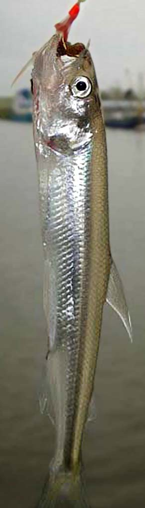 Osmerus eperlanus Stint an der Angel Quelle und Veröffentlichungs-Einverständnis von "Pruss, Thomas" eingestellt von -- WHell 08:16, 23. Nov 2005 (CET)